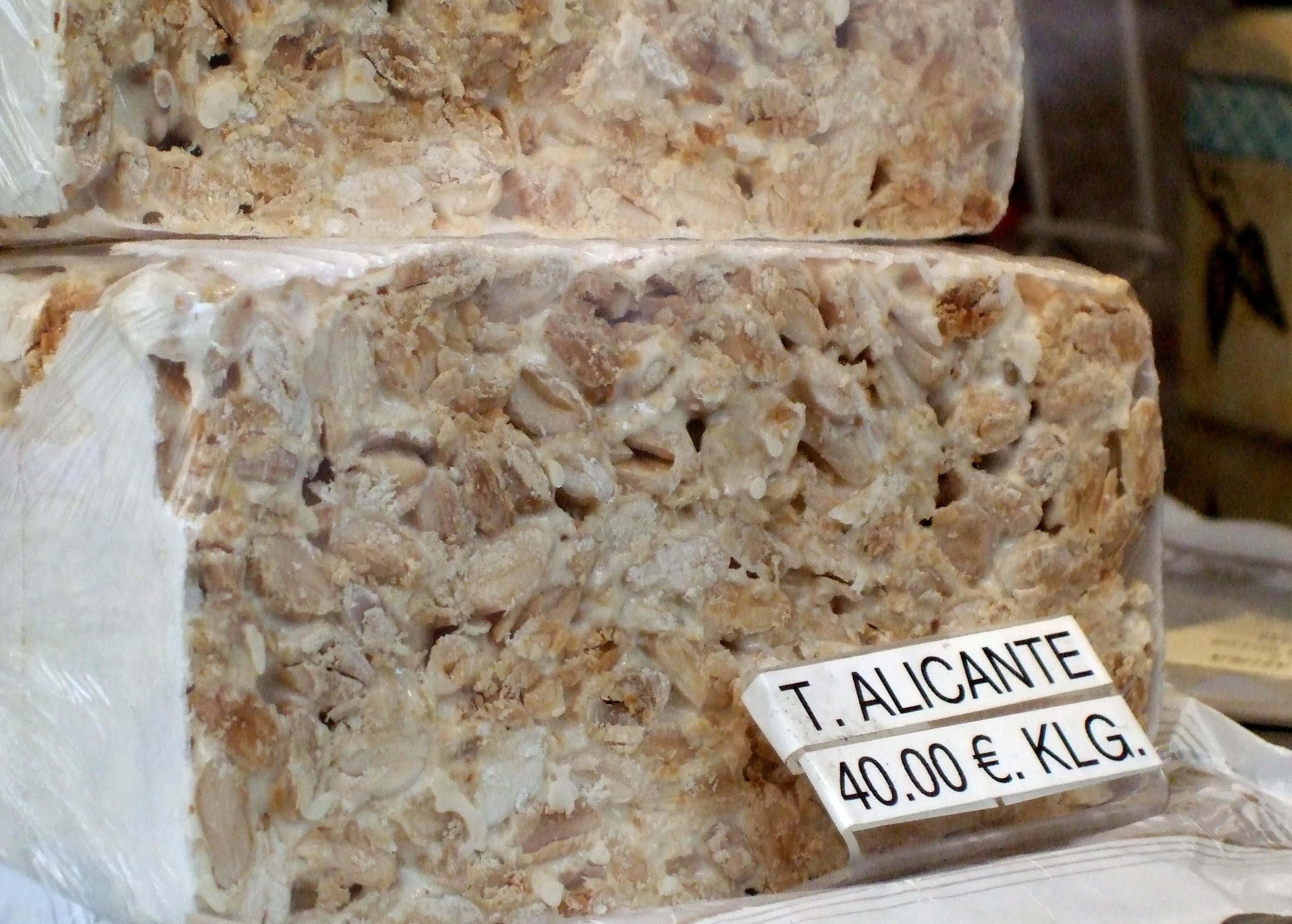 Turrón de Alicante en Casa Mira. Carrera de San Jeronimo. Madrid.